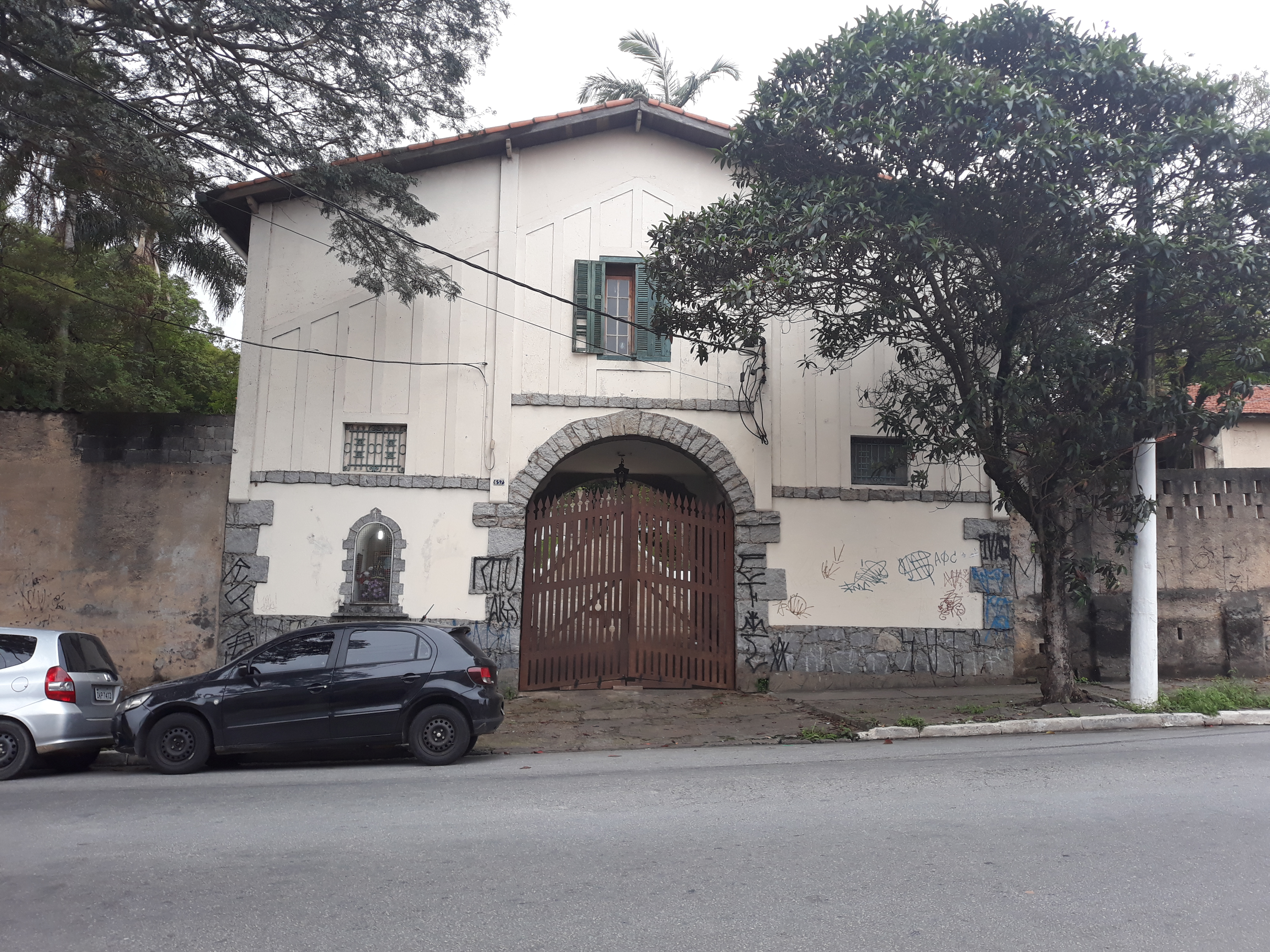 Português do Brasil: A fachada do Casarão na Rua Sabbado D'angelo. Em São Paulo (SP), Brasil.